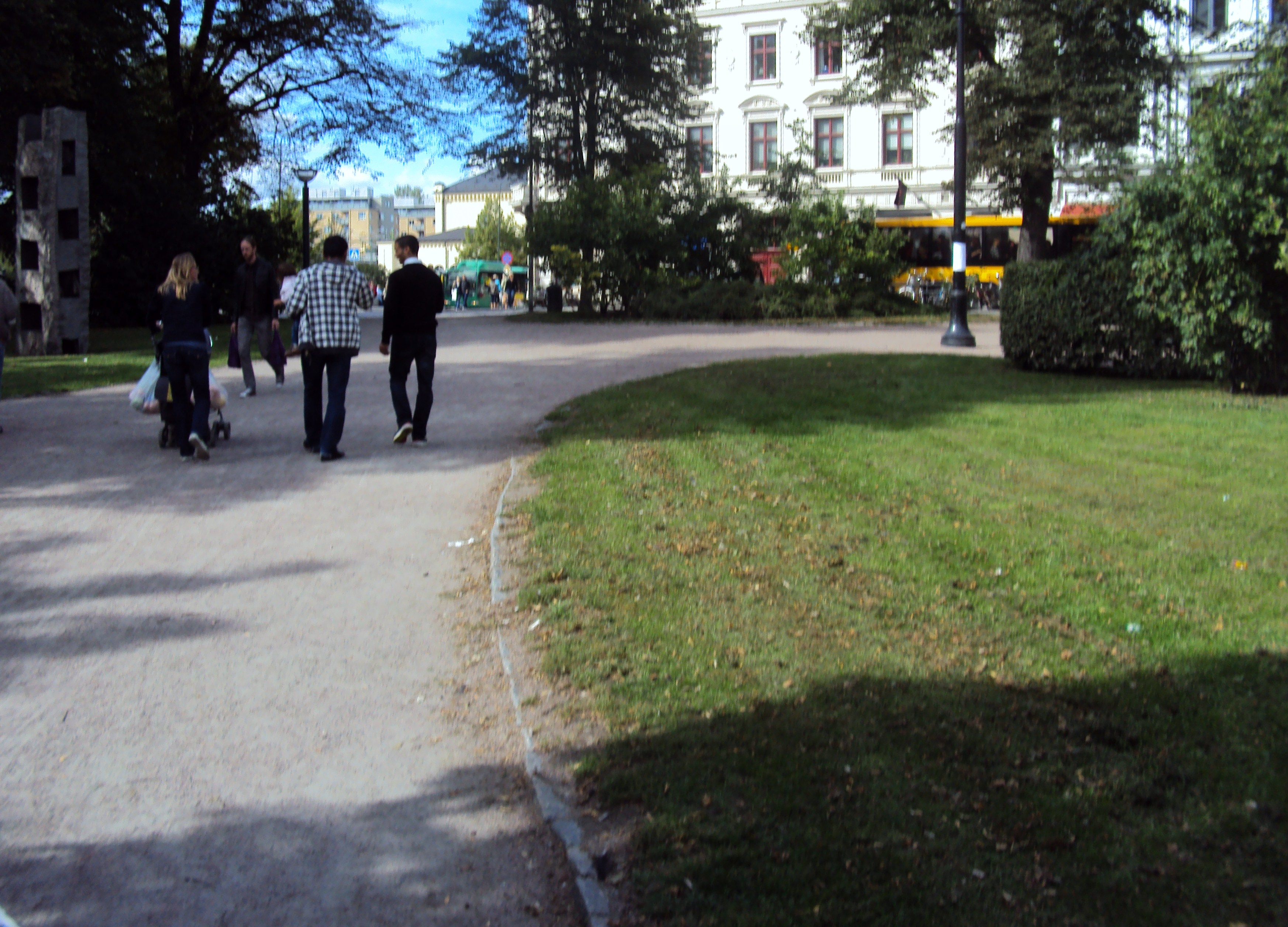 Bantorget i Lund